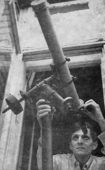 Stanisław Robert Brzostkiewicz, polski popularyzator astroniomii